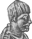 Einziges bekanntes zeitgenössisches Porträt des Odoaker, auf einer italienischen Münze aus seiner Regierungszeit.